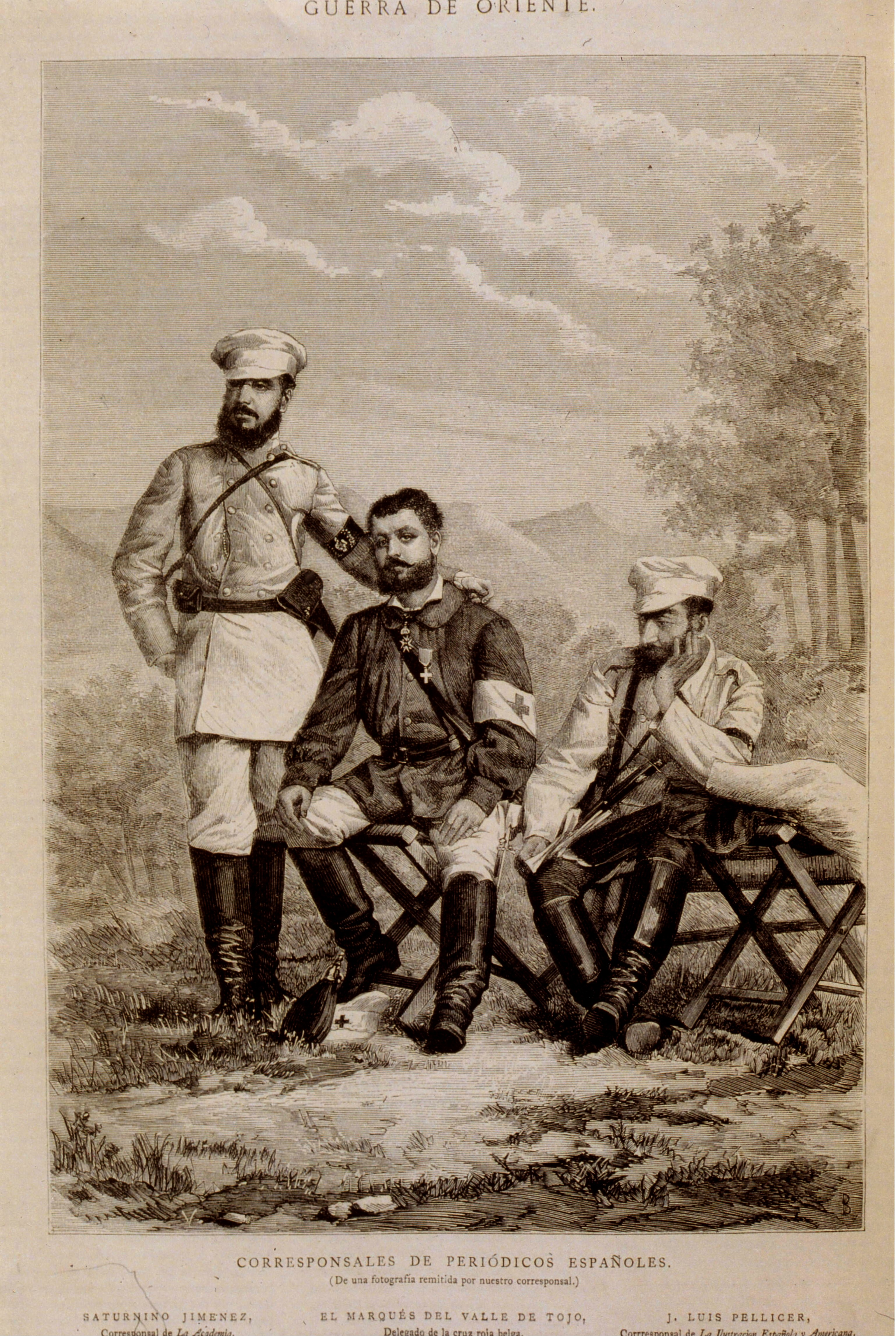 El Marqués del Valle de Tojo, Don Vicente del Sol, delegado de la Cruz Roja belga en la Guerra de Oriente (1875-1878). Junto a él, de pié, Saturnino Giménez Enrich, corresponsal de La Academia; y Joseph Luis Pellecier, corresponsal de La Ilustración Española y Americana. Ilustración atribuida al grabador Eugenio Vela y al dibujante Ricardo Balaca. Foto de La Académia, tomada del Archivo de la Familia Campero-Alvarado de Tucumán